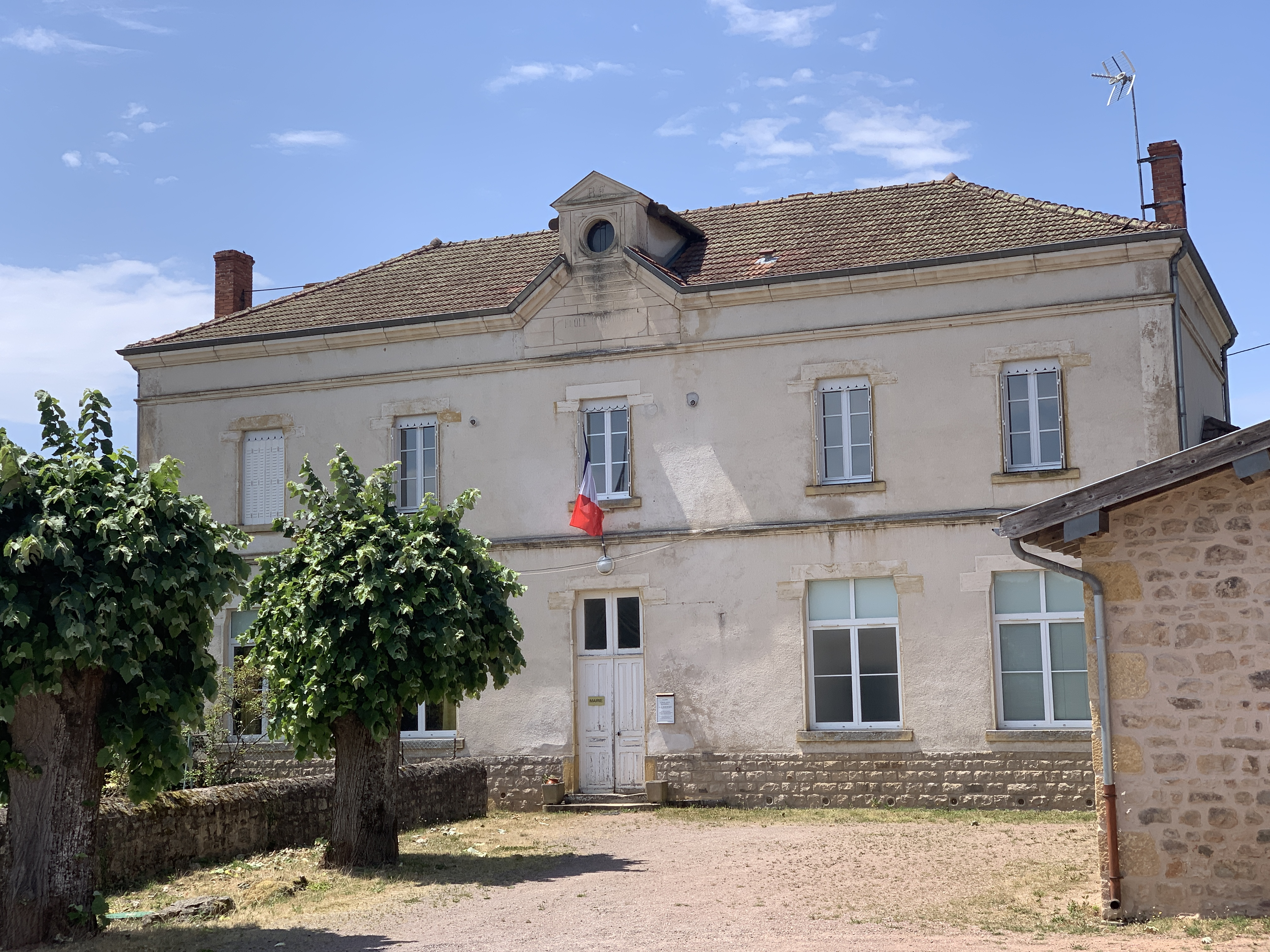 Mairie de Curtil-sous-Buffières.